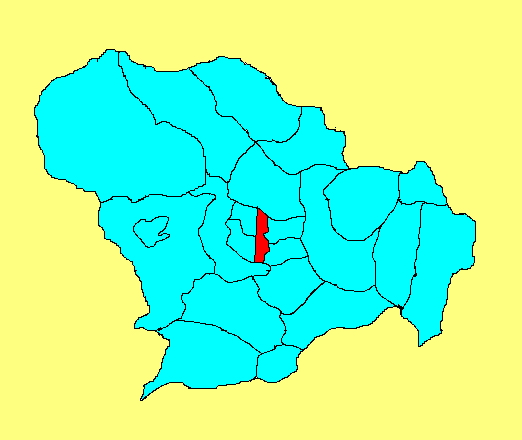 桥东区在石家庄市的位置（此图片由王云峰wangyunfeng原创，用于WIKI。）